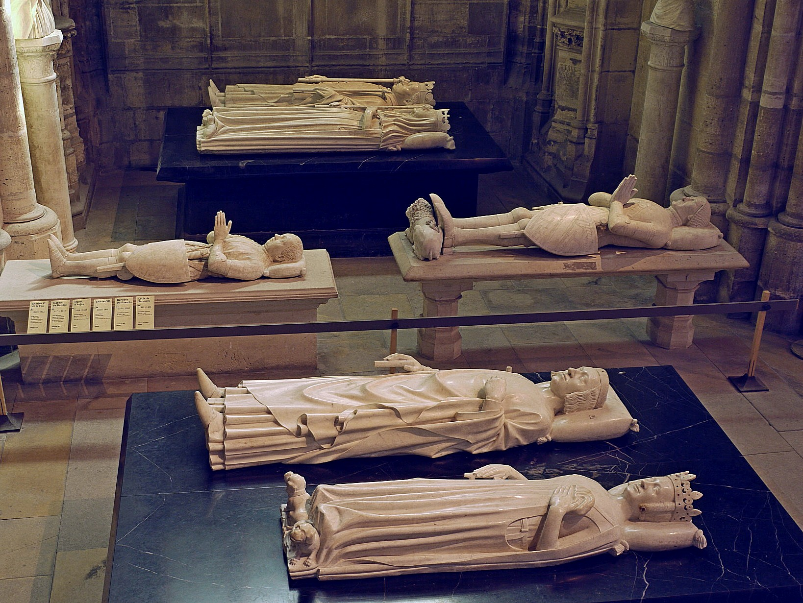 Gisant de Charles V et de Jeanne de Bourbon, au premier plan, dans la basilique Saint-Denis (France). .